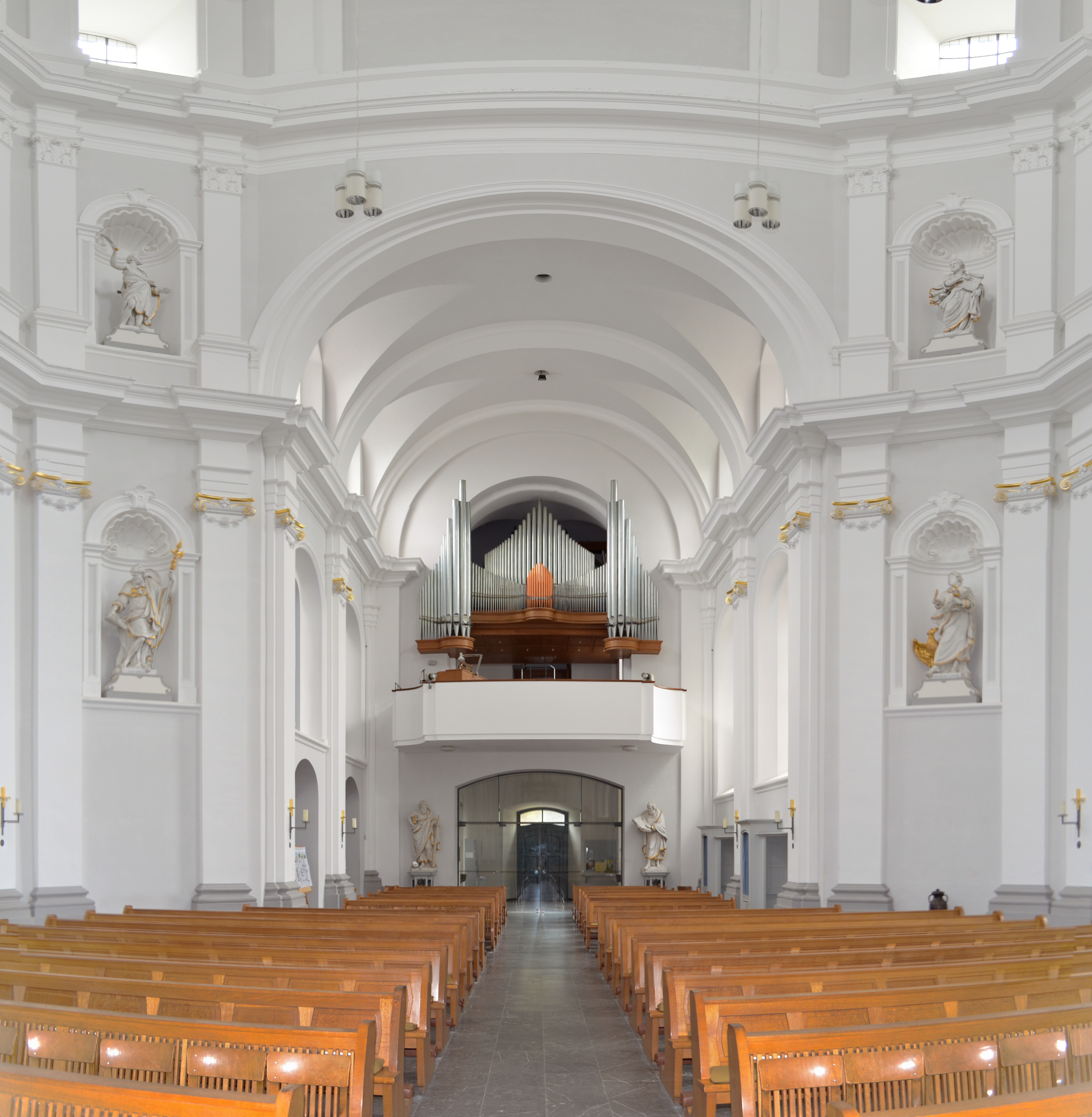 St. Johann Baptist in Aachen-Burtscheid, Innenansicht von Nordosten